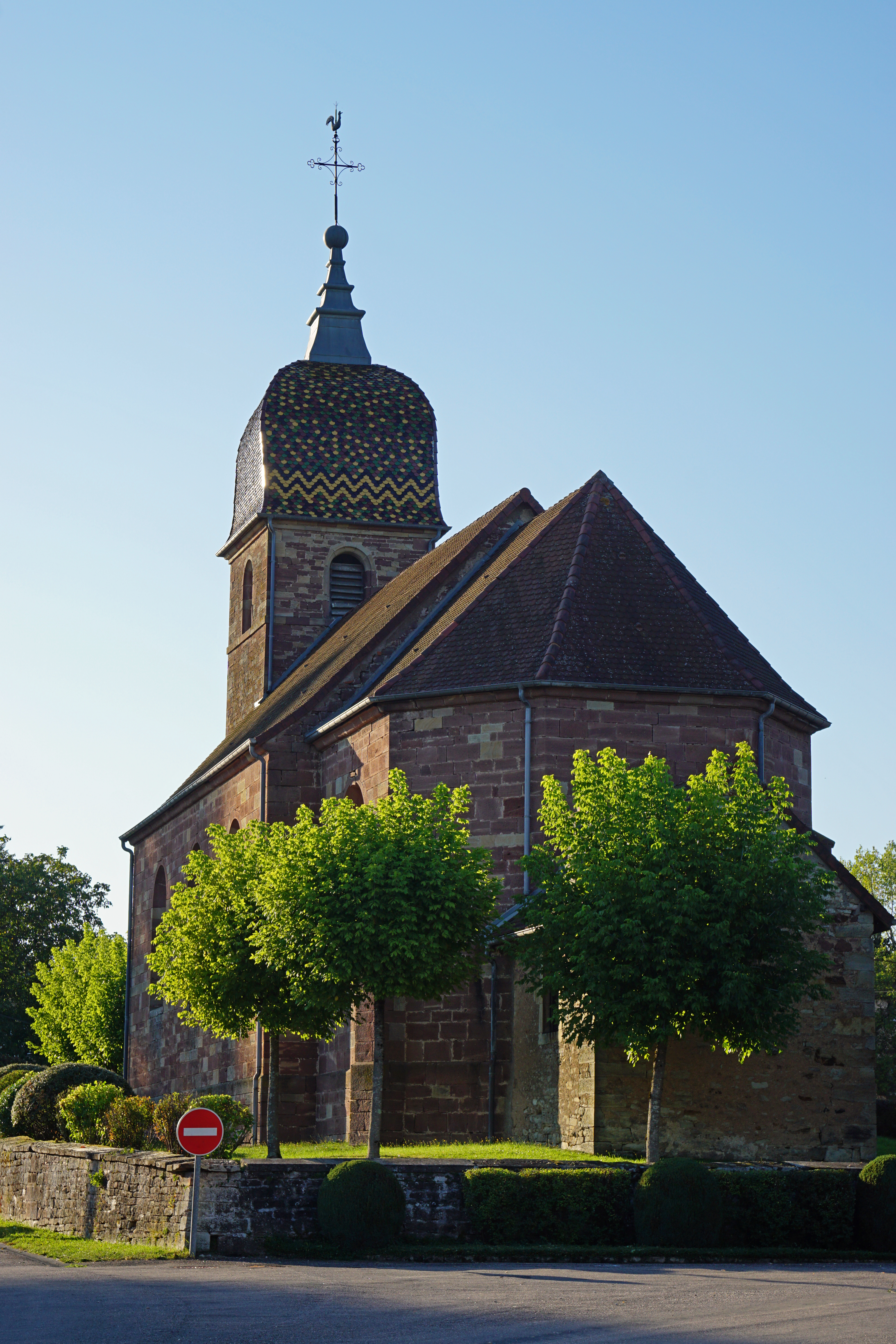 L'église Saint-Laurent de Frotey-lès-Lure (70).